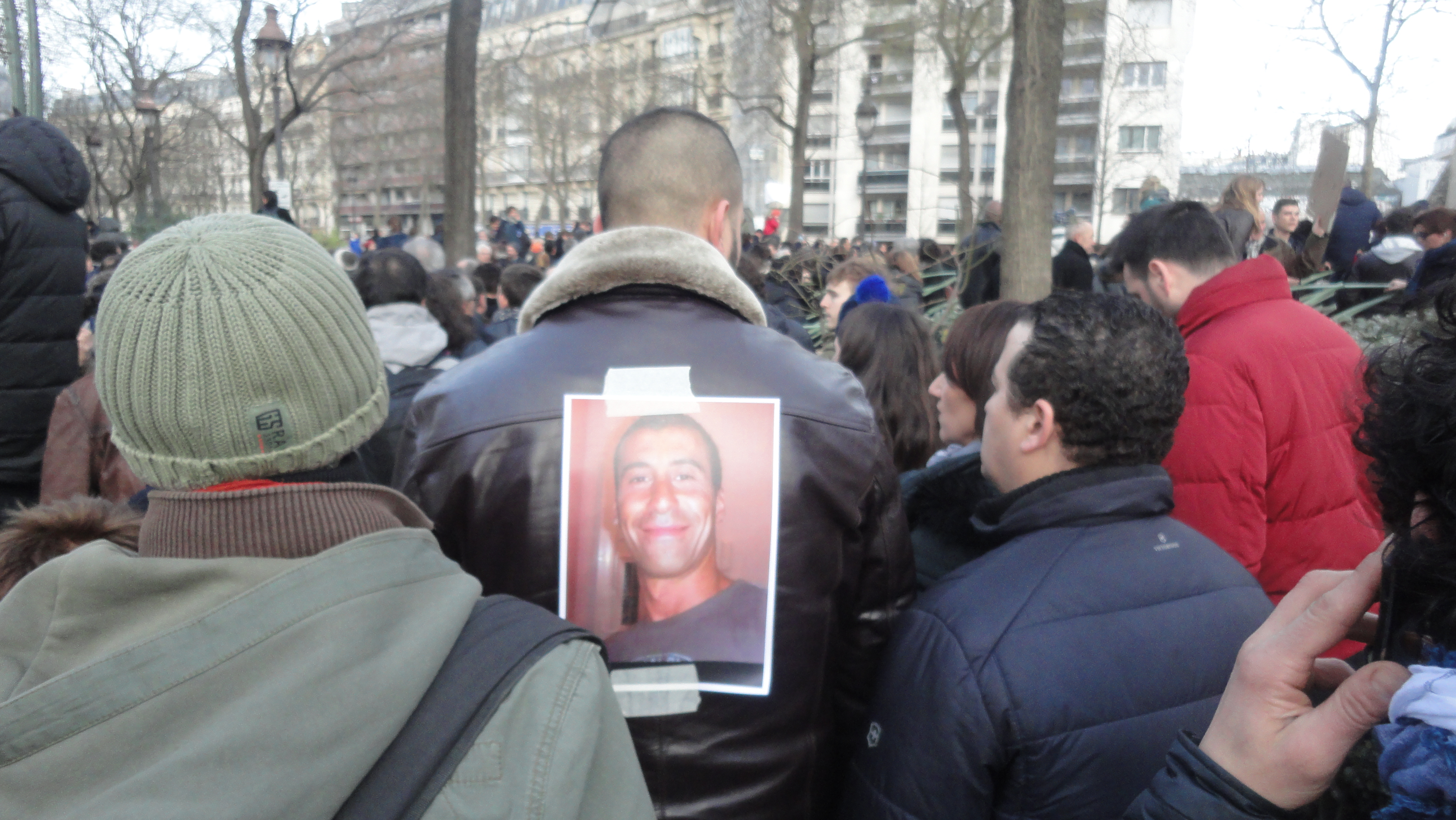 Je Suis Charlie 20150111 Paris Anonymes